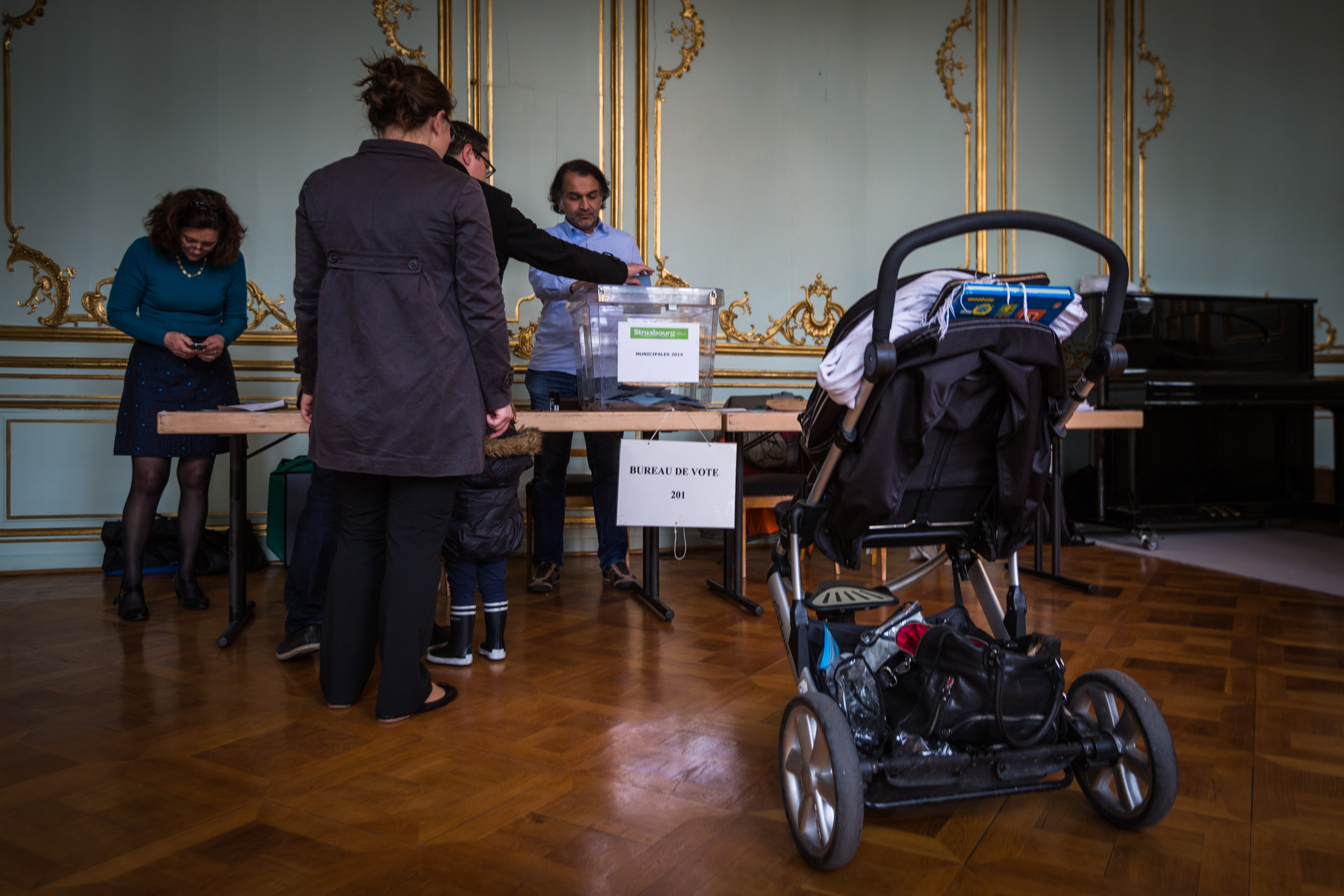 Strasbourg 1er tour des élections municiapales 23 mars 2014